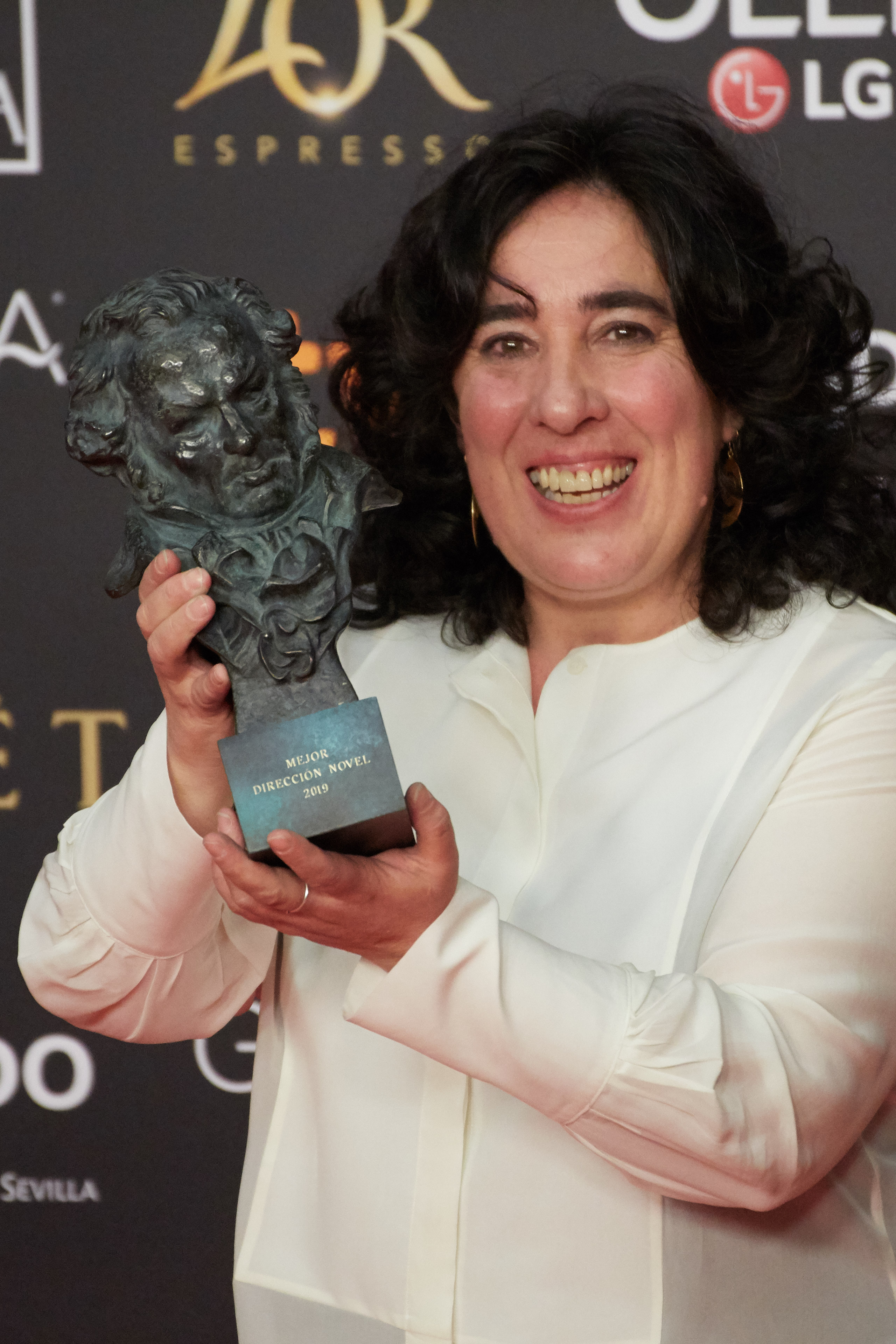 Arantxa Echevarría exhibiendo su Goya a la Mejor Dirección Novel por Carmen y Lola